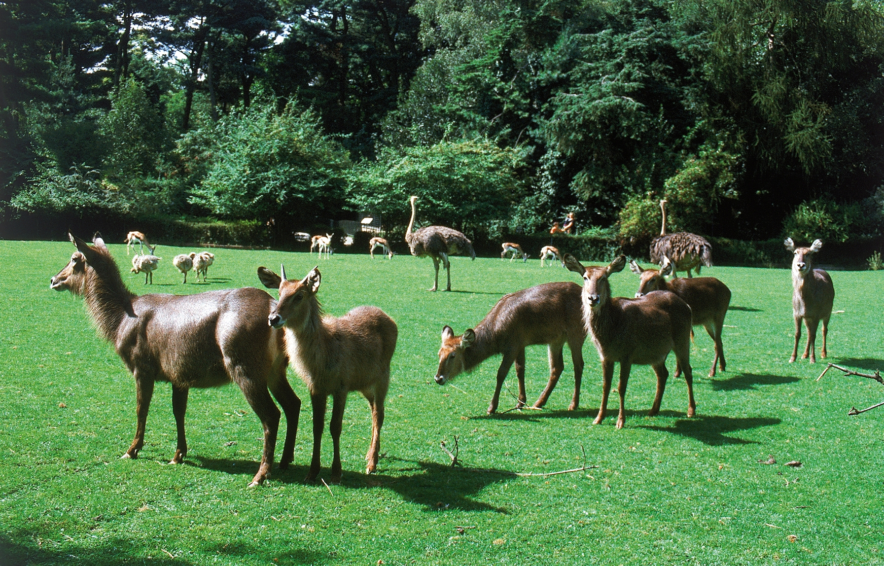 Ein Blick auf die Afrikawiese im Zoo Krefeld